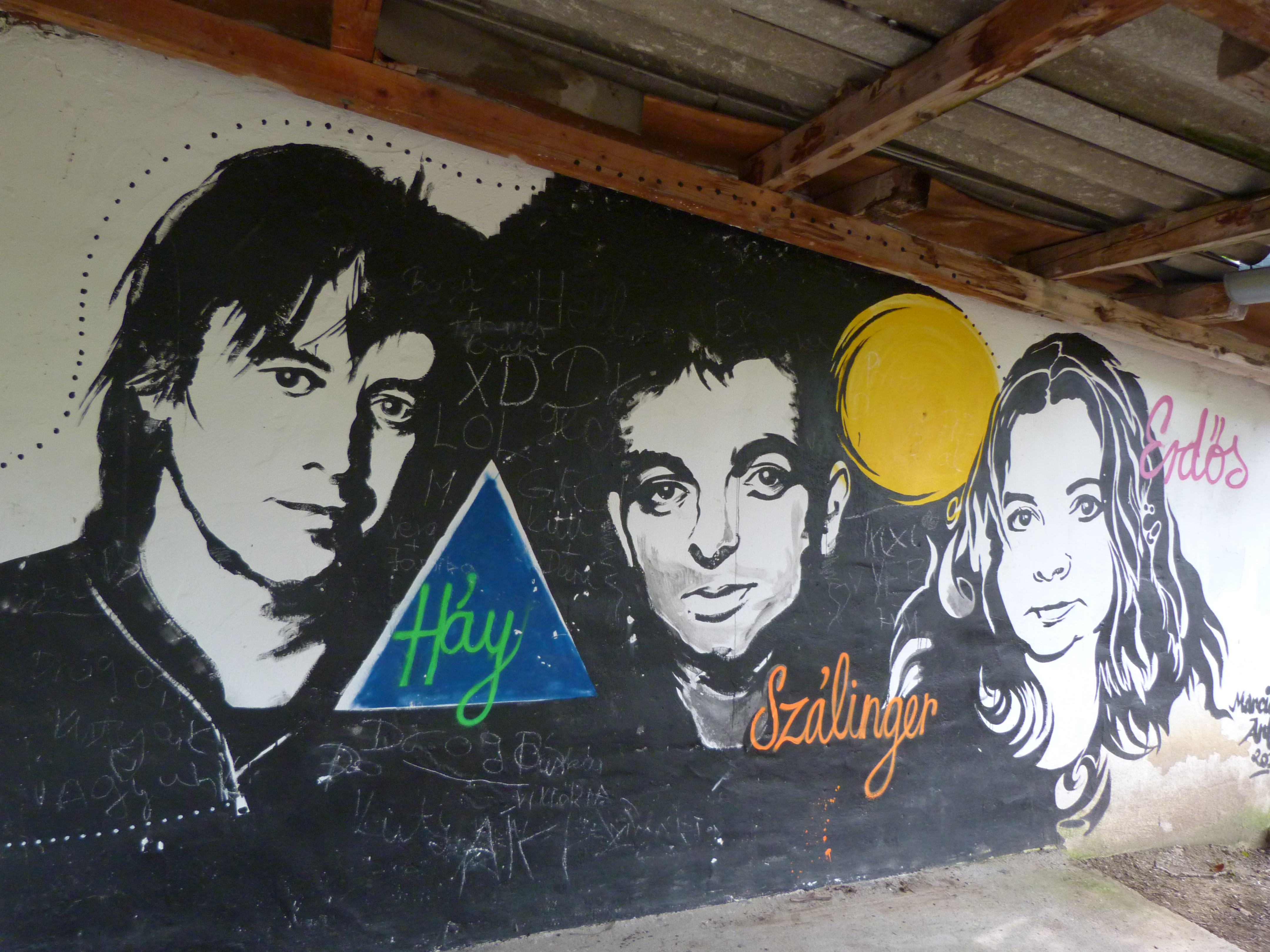 A felvétel 2014. augusztus 6-án szerdán készült Nagyharsányban. 7. Ördögkatlan Fesztivál. Bódvalenke graffiti falu plakátokon. ©© Derzsi Elekes Andor, Budapest, 2014, A kép és filmfelvételek egészben, vagy részletekben másolását, bármilyen úton történő sokszorosítását és felhasználását a szerző ellenérték nélkül, jogutódjaira is kihatóan megengedi. Az engedély kiterjed a kereskedelmi célú hasznosításra is. Kéri azonban nevének feltüntetését a felhasználás során. A Metapolisz sorozat valamennyi képe és filmje Creative Commons alatti valamint kereskedelmi - for profit - célra is felhasználható. Ajánlott hivatkozás: Derzsi Elekes Andor: Metapolisz DVD line